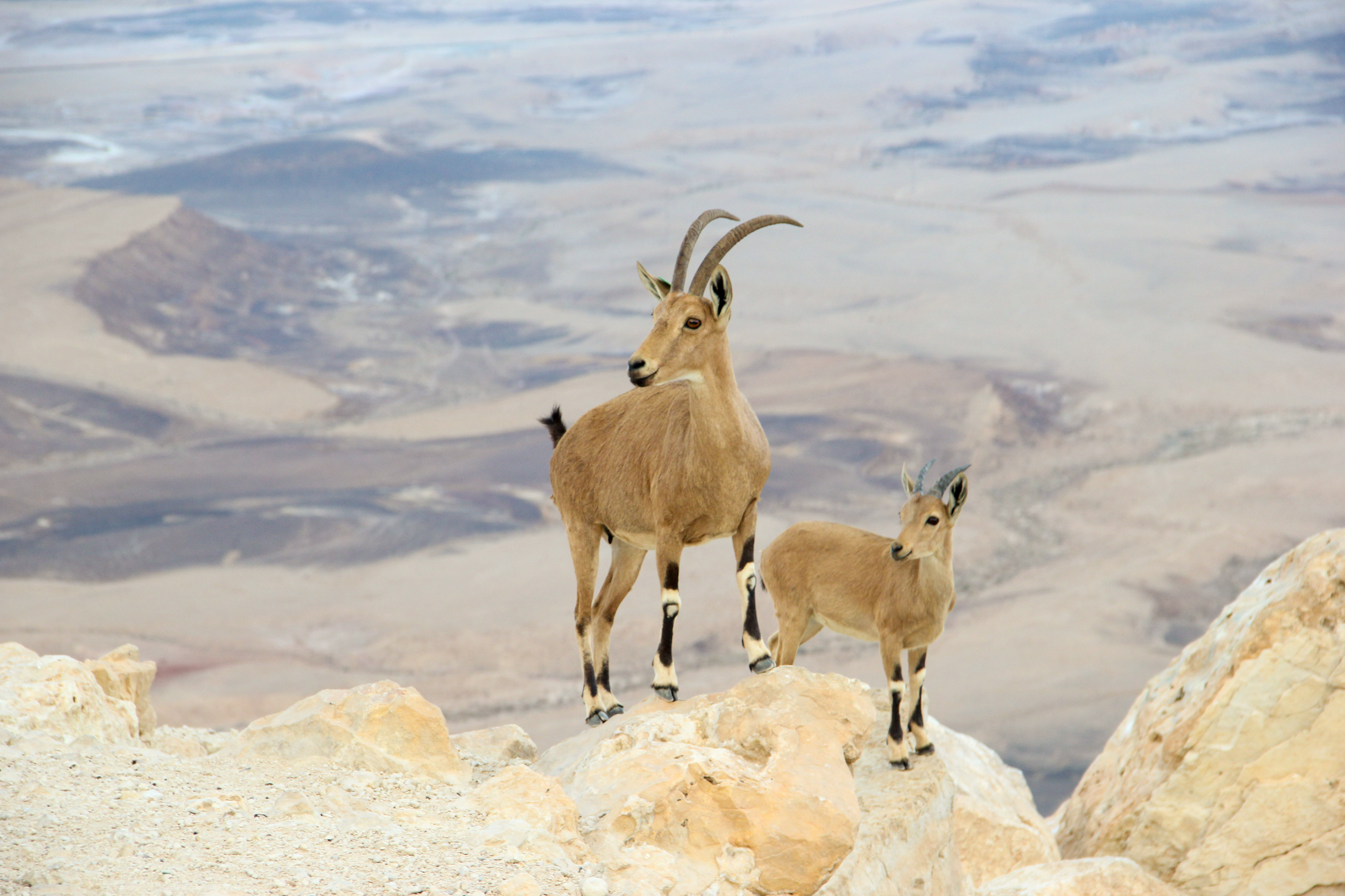 מכתש רמון הוא המכתש האירוזי הגדול בעולם. הוא מצוי בישראל ומהווה אחד מחמשת המכתשים שבנגב. נופו של מכתש רמון הוא ייחודי. על קצה המכתש מצויה העיירה מצפה רמון.